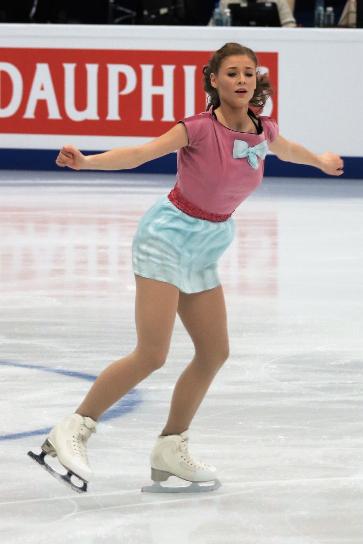 Лорен Лекавалье (Франция) на Чемпионате Европы по фигурному катанию 2018.